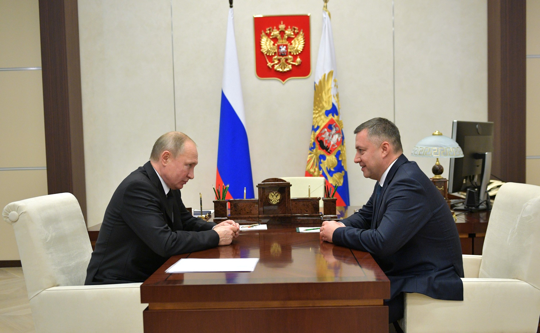 С Игорем Кобзевым, назначенным врио губернатора Иркутской области